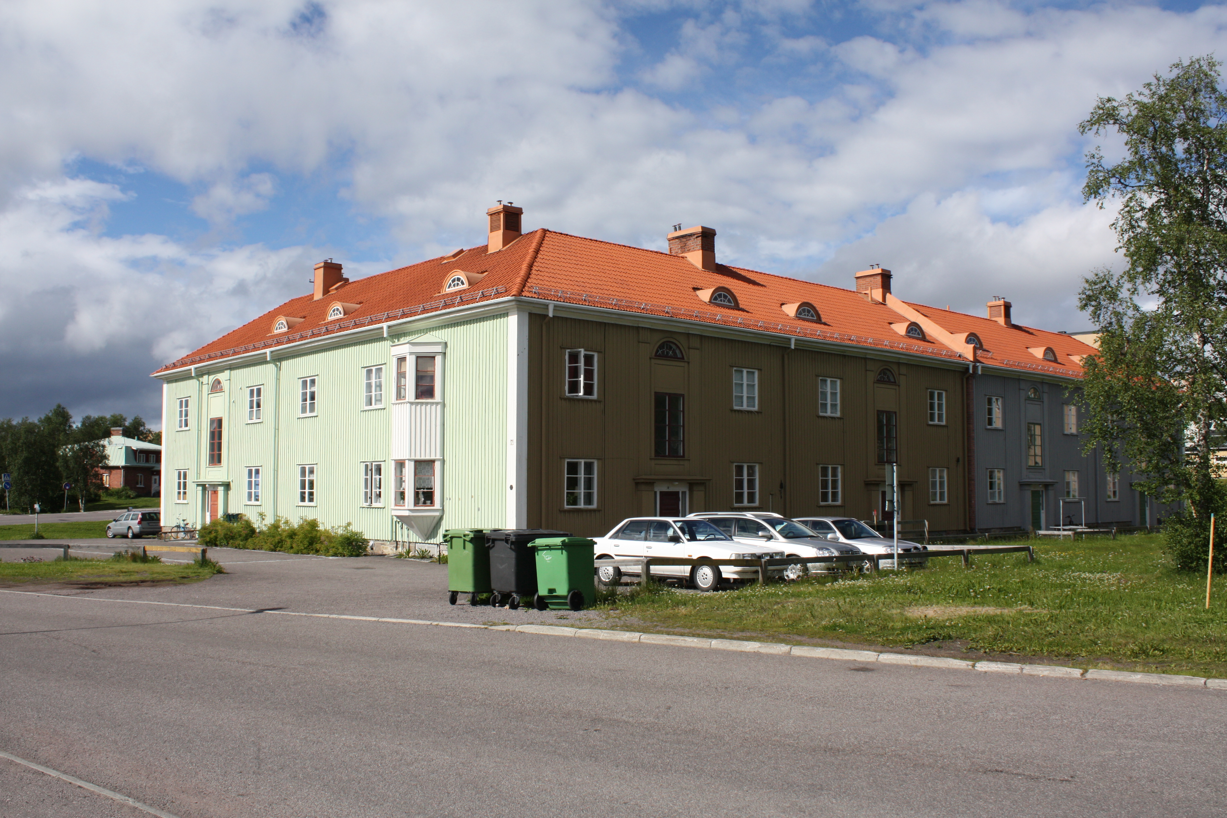 Hyresfastigheten Jerusalem från 1927 på Bolagsområdet i Kiruna.